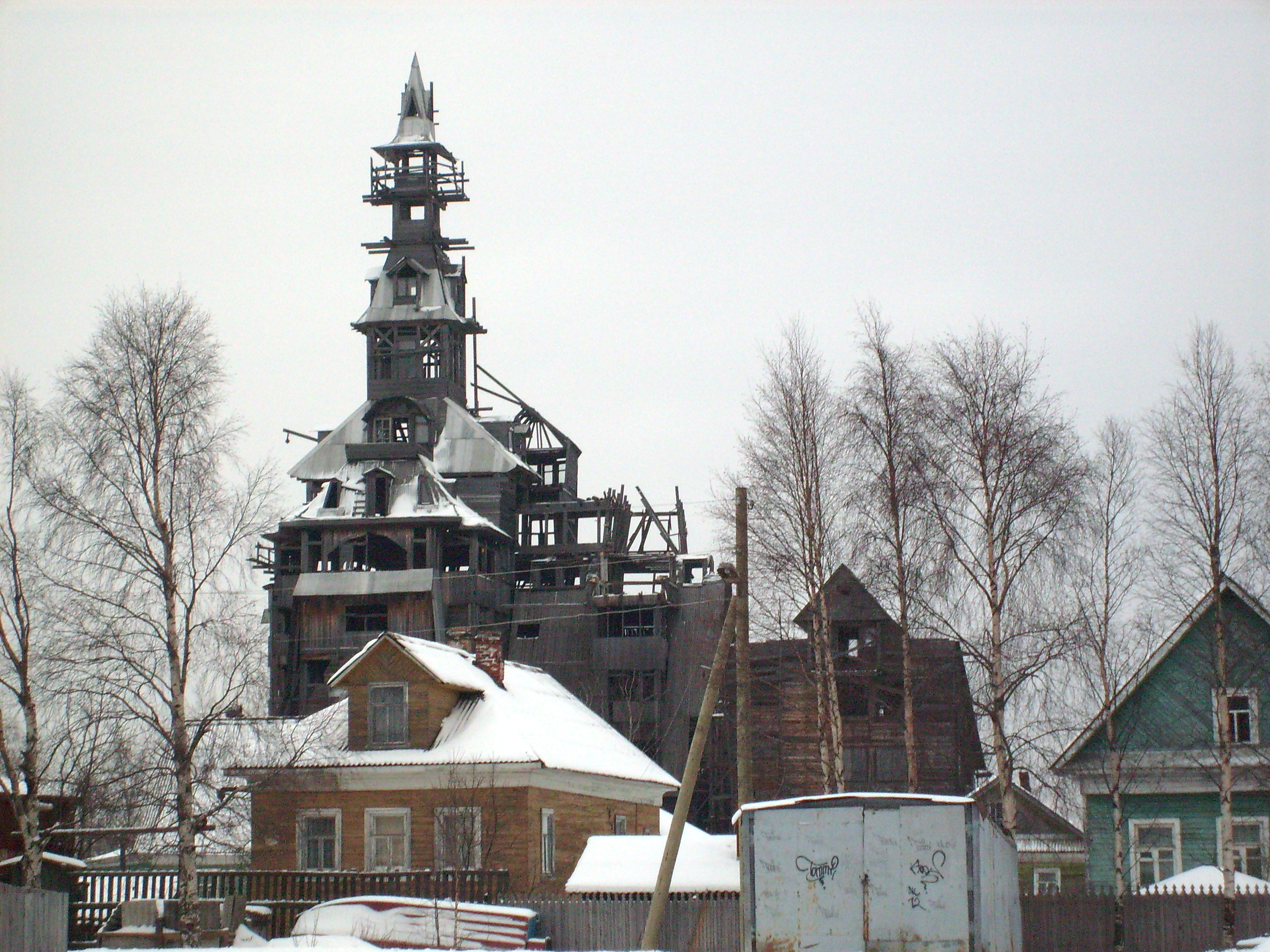 13-этажный деревянный дом Николая Сутягина в Архангельске